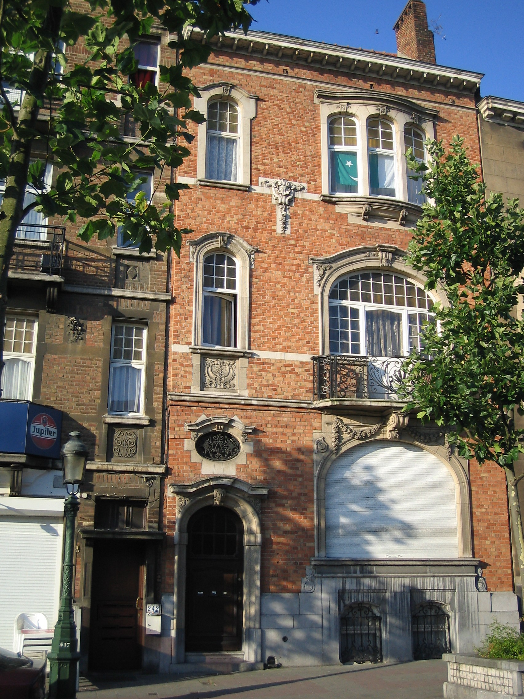 Maison de style Beaux-Arts au 244 boulevard Léopold II. Koekelberg.